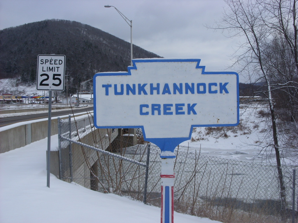 Keystone Marker for Tunkhannock Creek (Tobyhanna Creek) in Tunkhannock, Pennsylvania